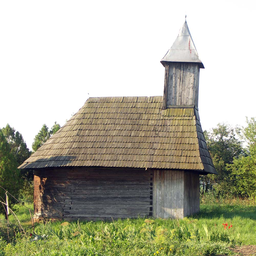 Biserica de lemn din Nicoleşti, judeţul Mureş.